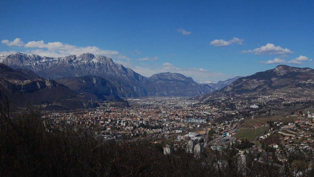 Trento visto dal Dosso di San Rocco di Villazzano